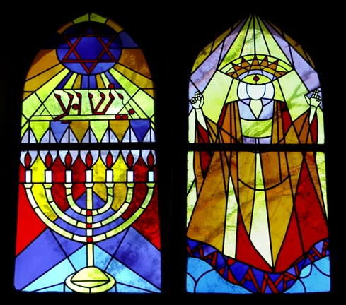 Reformationskirche in Magdeburg-Rothensee (Kirchenfenster)